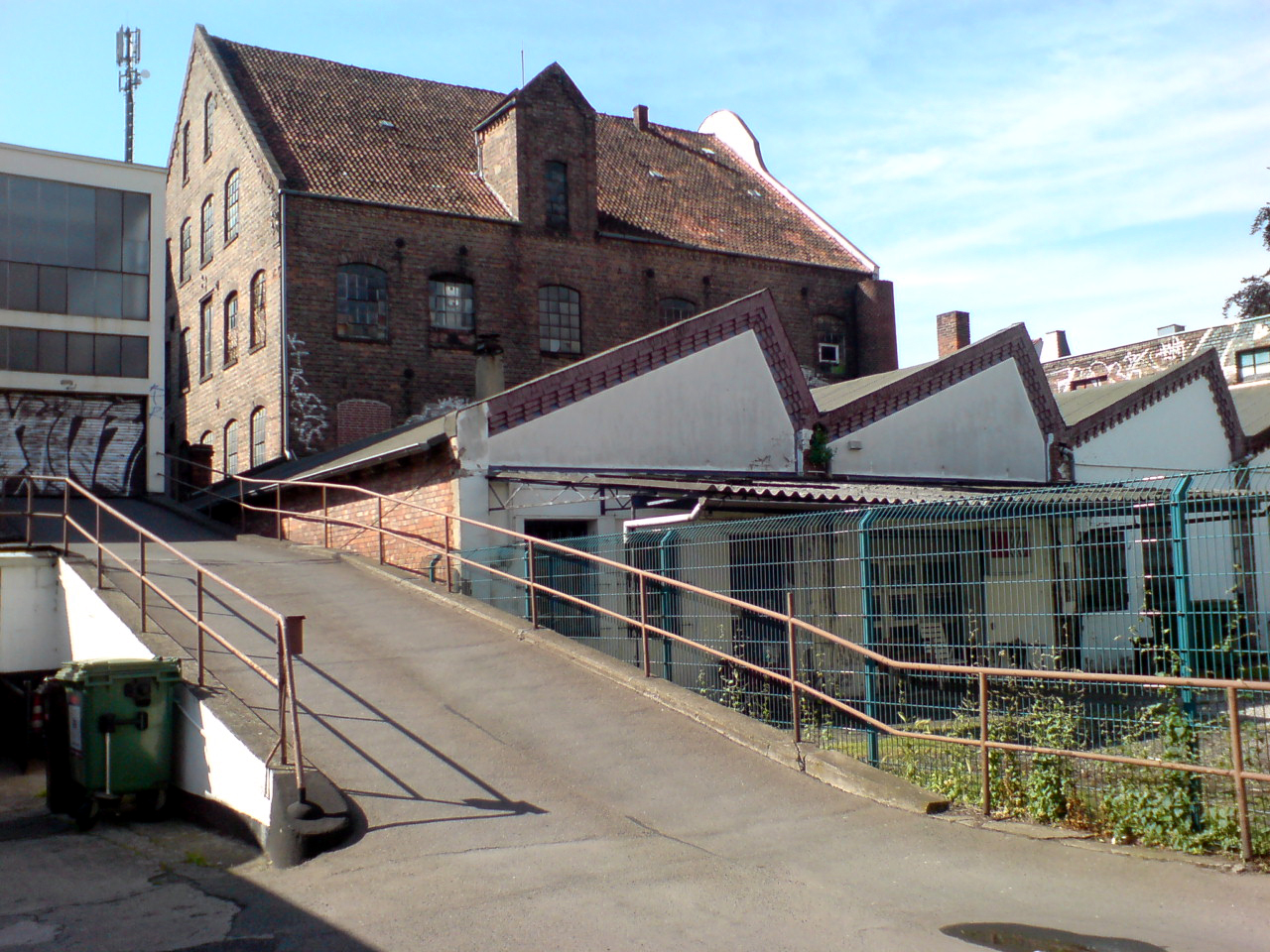 Auffahrt vor der Podbielskistraße 196 in Hannover, ehemals Möbelfabrik Dyes ...